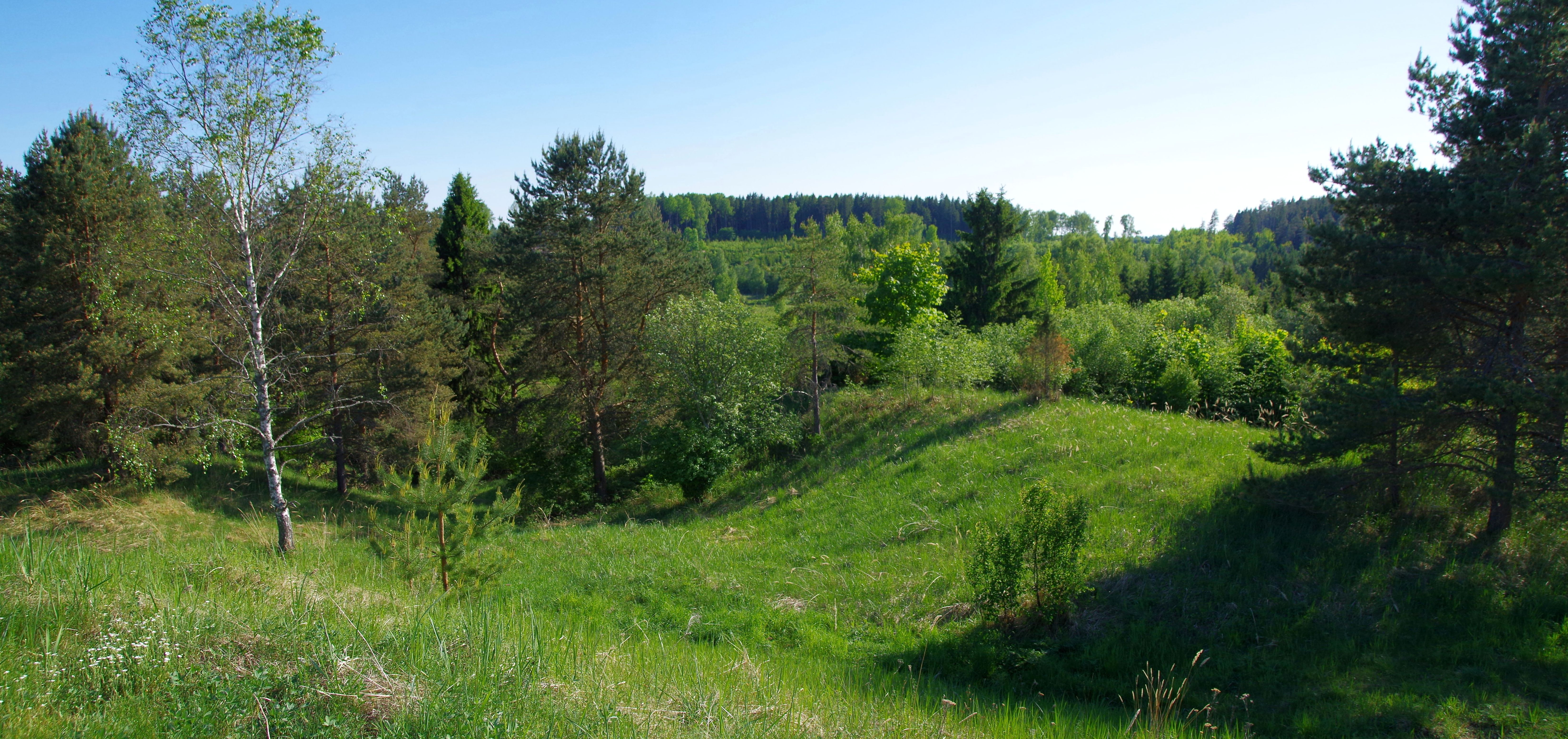 Saadjärve linnamägi on Kalevipoja sängi tüüpi linnus, mis asub Saadjärve mõisasüdamest 2 kilomeetrit idas Salu külas. Linnamäge nimetatakse ka Kalevipoja sängiks.